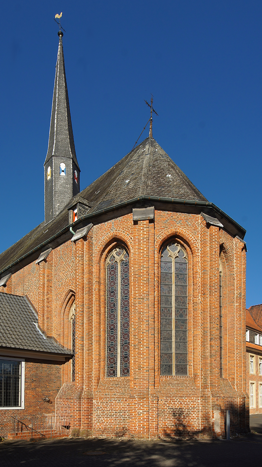 Die Klosterkirche St. Marien in Burlo, Stadt Borken (NRW). Der hier abgebildete Chor gehört zum ältesten Teil der Kirche und stammt aus der Zeit um 1300. Allerdings wurde die Kirche erst später, im 15. Jahrhundert, vergrößert und auf ihre heutige Höhe aufgestockt. Perspektivisch korrigierte Aufnahme. This is a photograph of an architectural monument. A1 - A 26